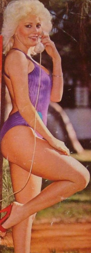 Luisa Albinoni- actriz argentina